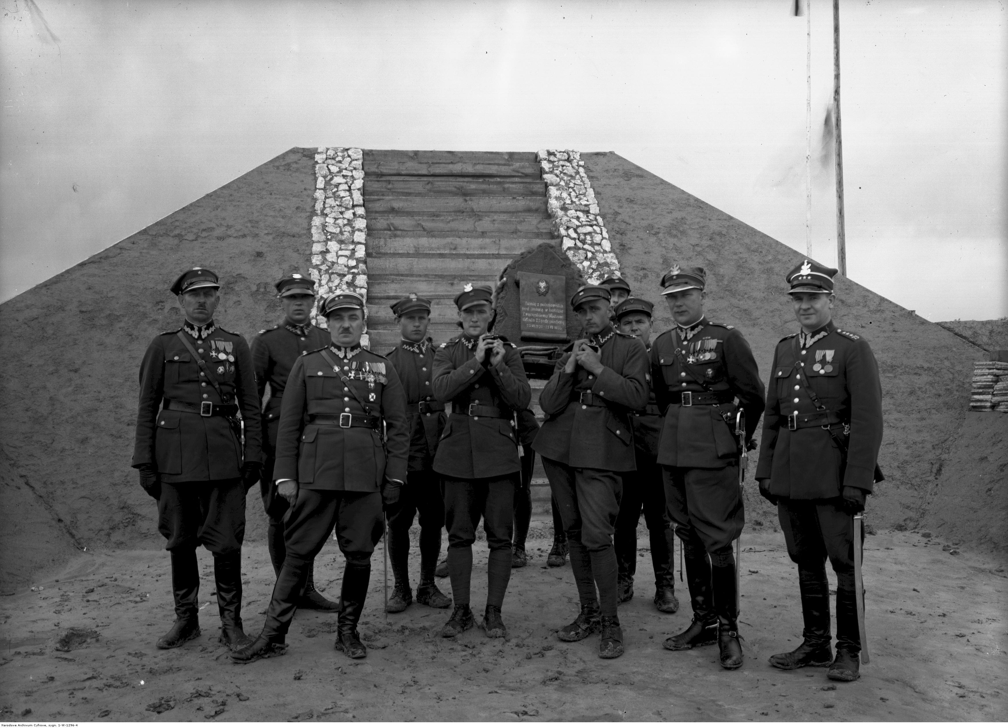 Delegacja 73 pułku piechoty w Krakowie. Żołnierze na tle kopca na Sowińcu trzymają urnę z ziemią z bitwy pod Indurą; Kraków 1935. Koncern Ilustrowany Kurier Codzienny - Archiwum Ilustracji. Sygnatura: 1-W-1296-4